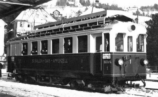 Im Bahnhof Teufen präsentiert sich der anlässlich der Elektrifikation beschaffte Triebwagen BCFeh 4/4 Nr. 1.